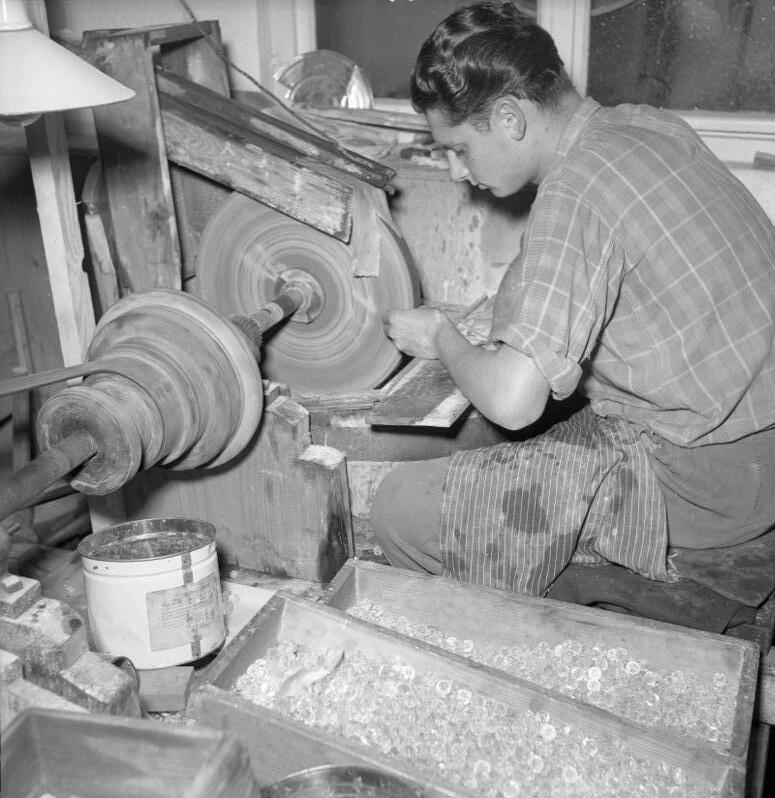 Glasindustrie Emil Zenkner, Weidenberg Schleifen von Englischperlen (eckige Perlen)